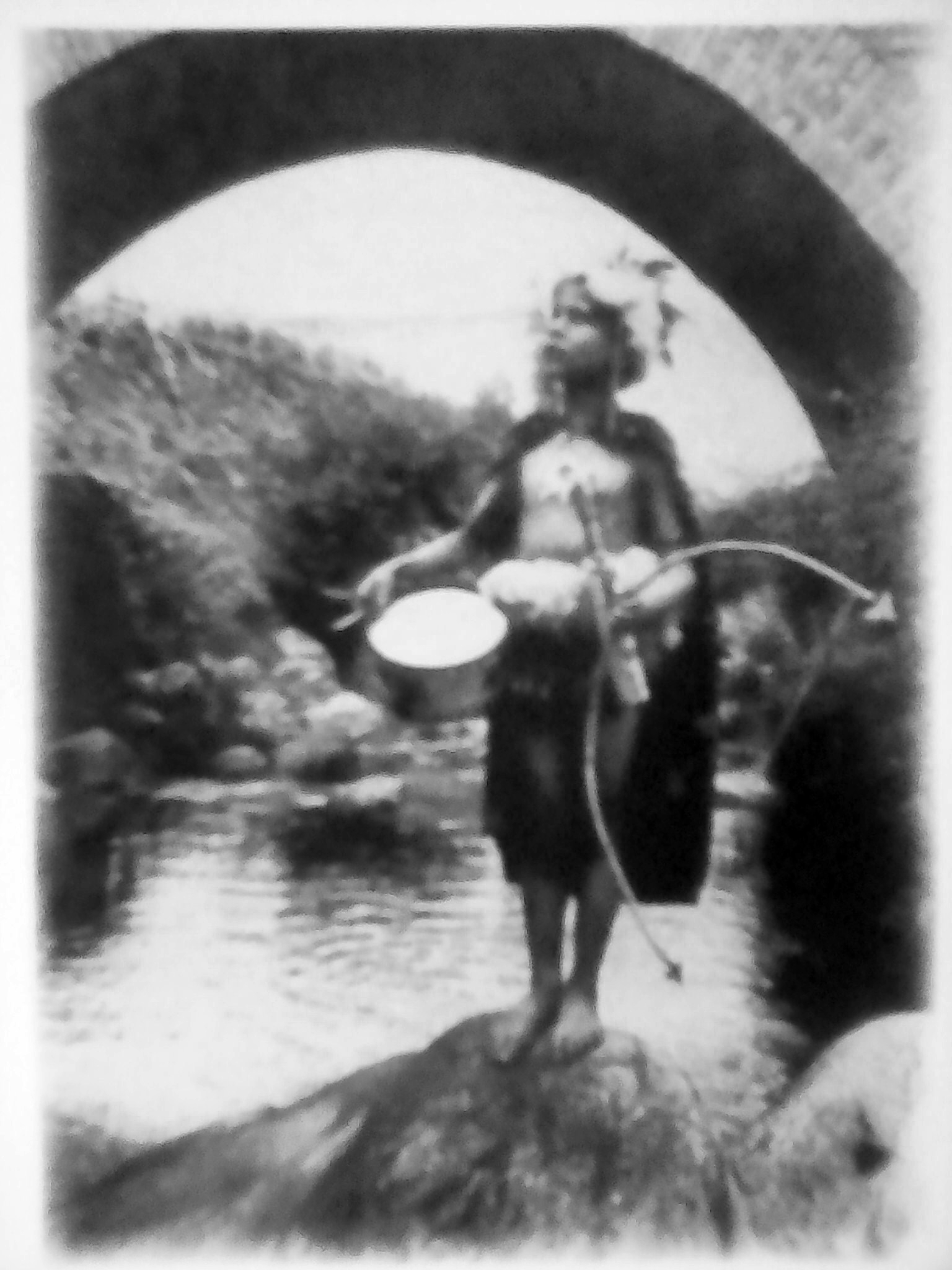 Niño muisca fotografiado por Luis Benito Ramos en 1935, en el departamento de Boyacá.